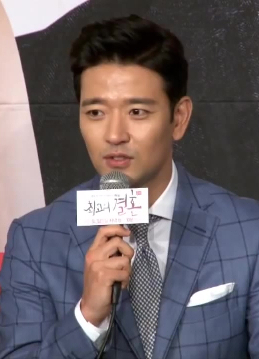 최고의 결혼 박시연·배수빈, 제 결혼 점수는요… (MD동영상)